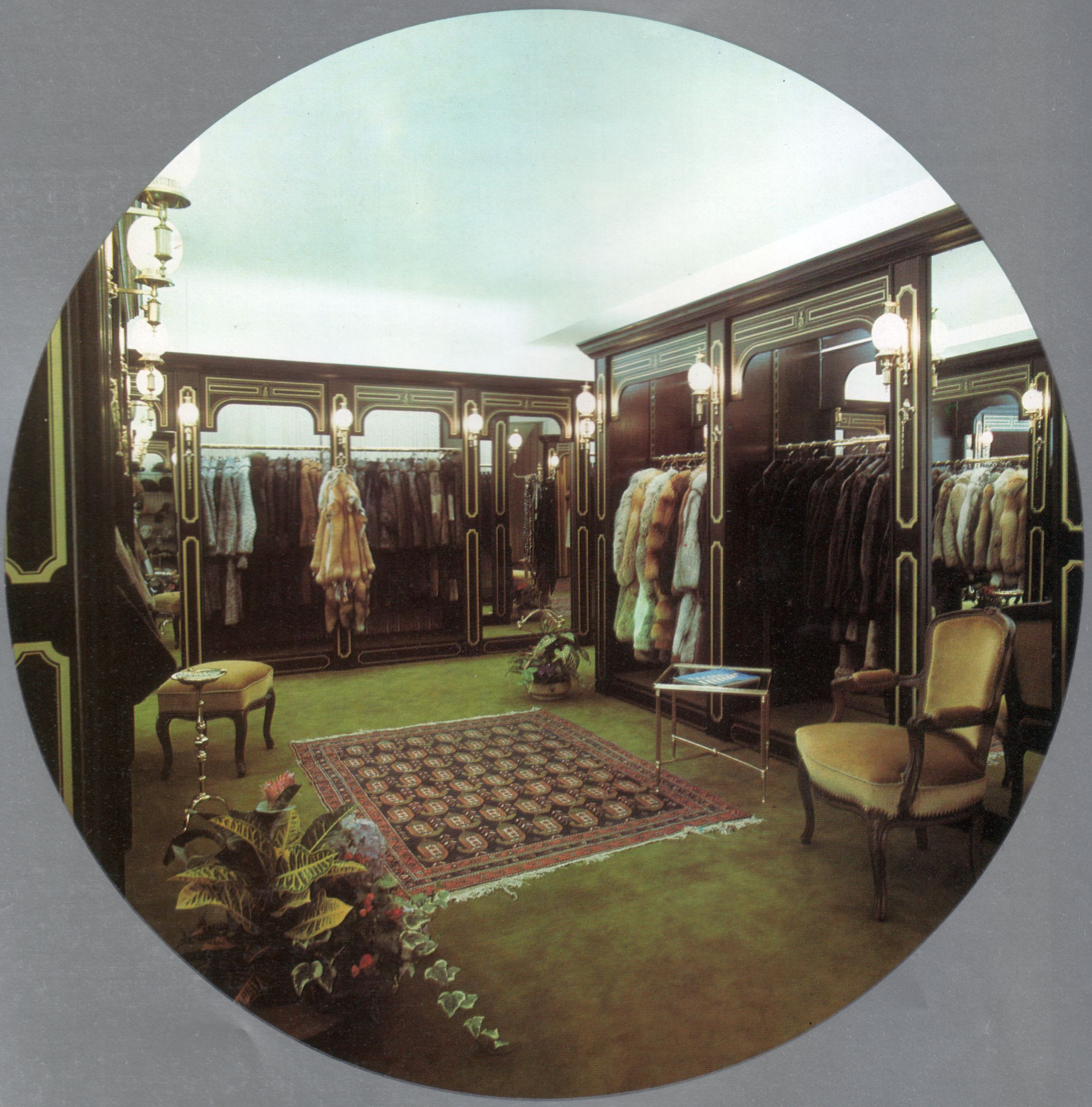 Pelzhaus F. W. Jordan. (Brixius Ladenbau Trier, vor Januar 1978).